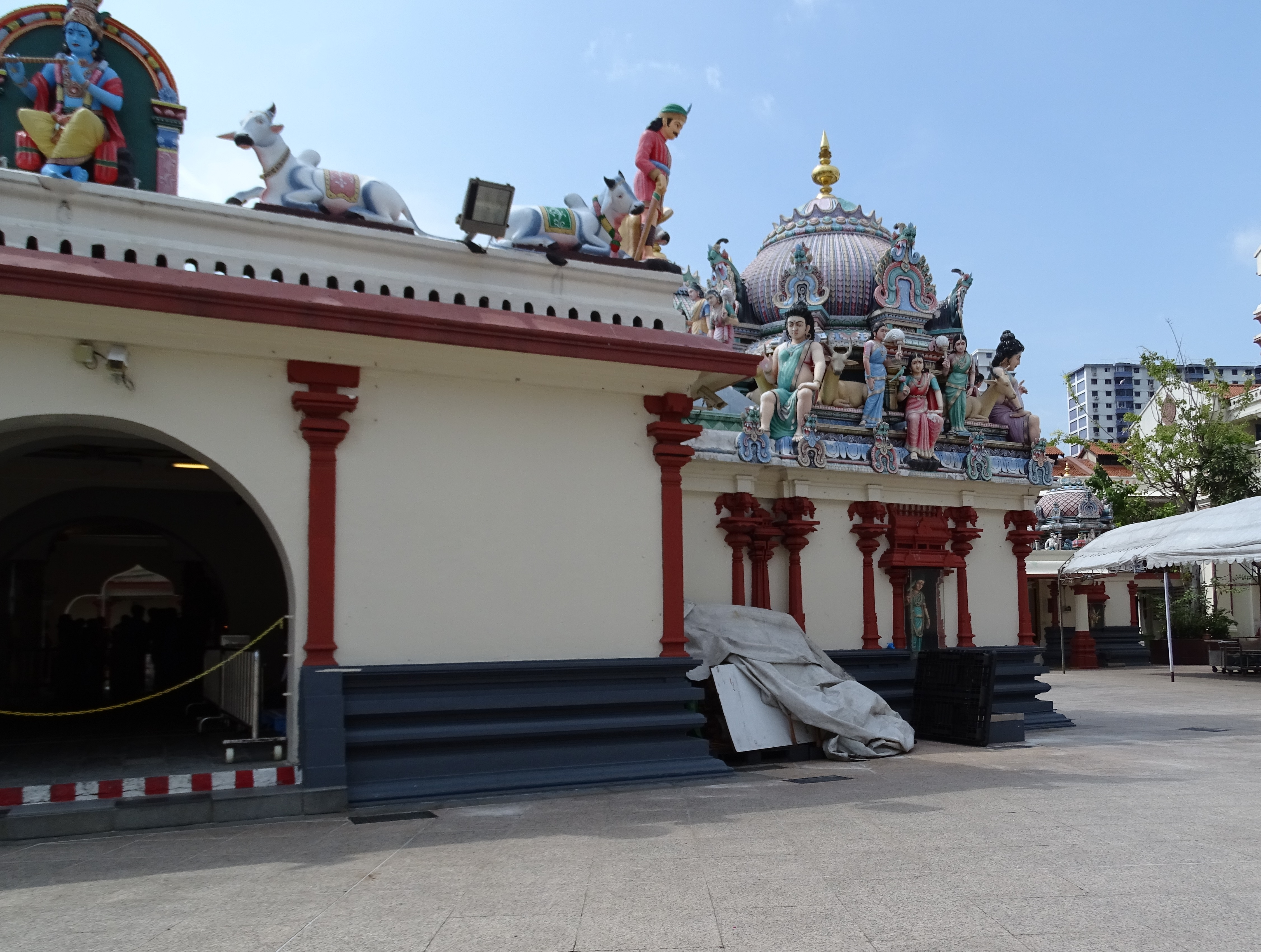 Sri Mariamman Temple in Singapur, Detail